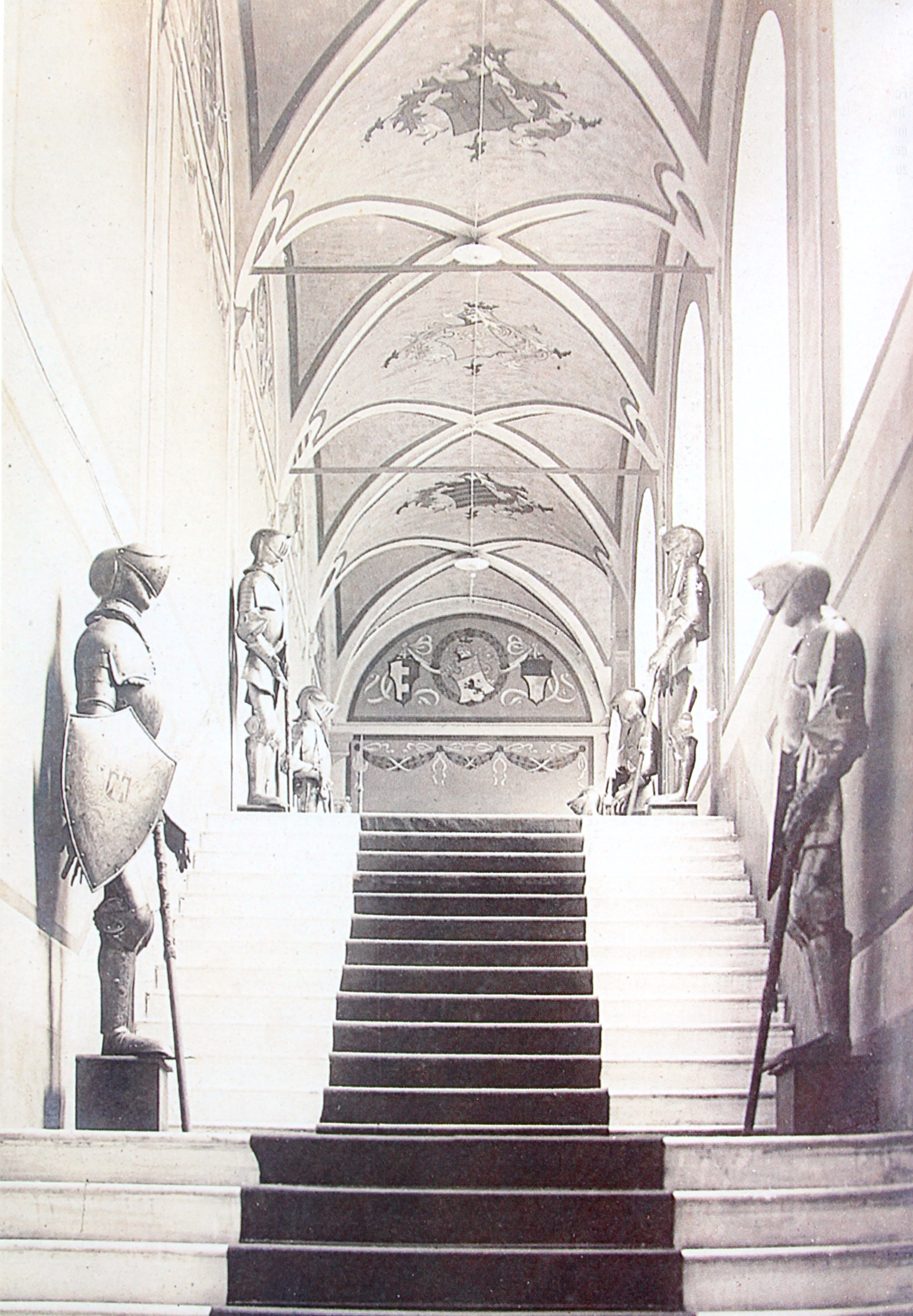 Isola Maggiore Aufgang in der Villa Isabella, um 1900